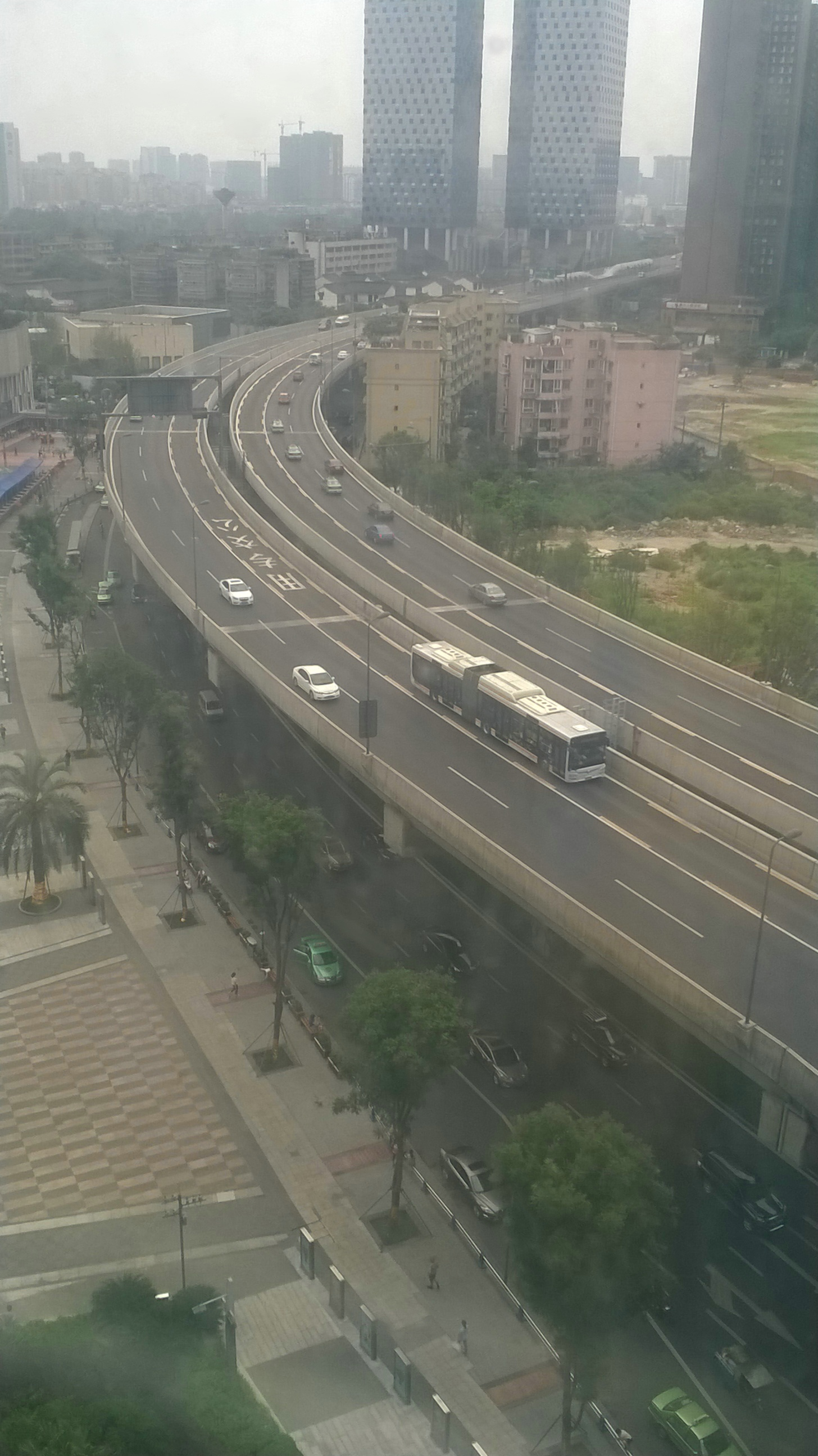 成都市二环路高架路及成都市二环路快速公交